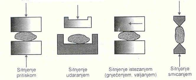 Врсте ситњења према дејству силе која узрокује ситњење